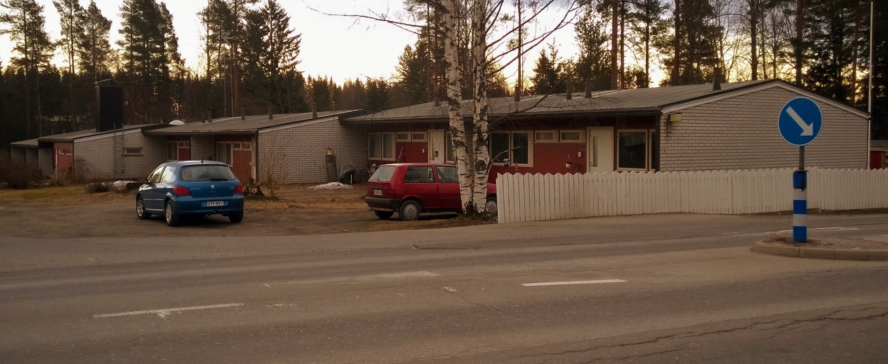 Rivitalo Vihtavuoressa